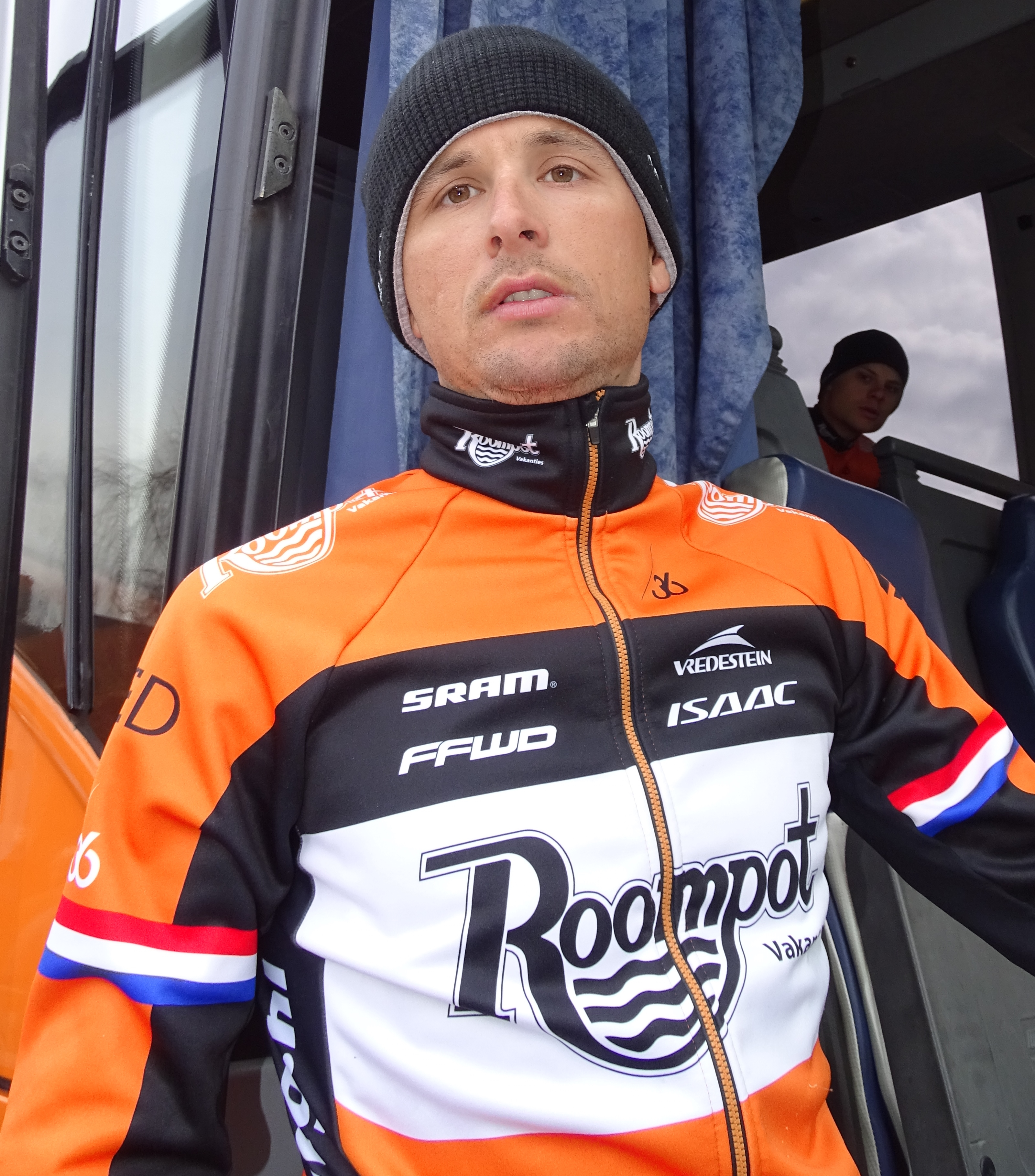 Reportage réalisé le vendredi 27 mars à l'occasion du départ et de l'arrivée du Grand Prix E3 2015 à Harelbeke, Belgique.